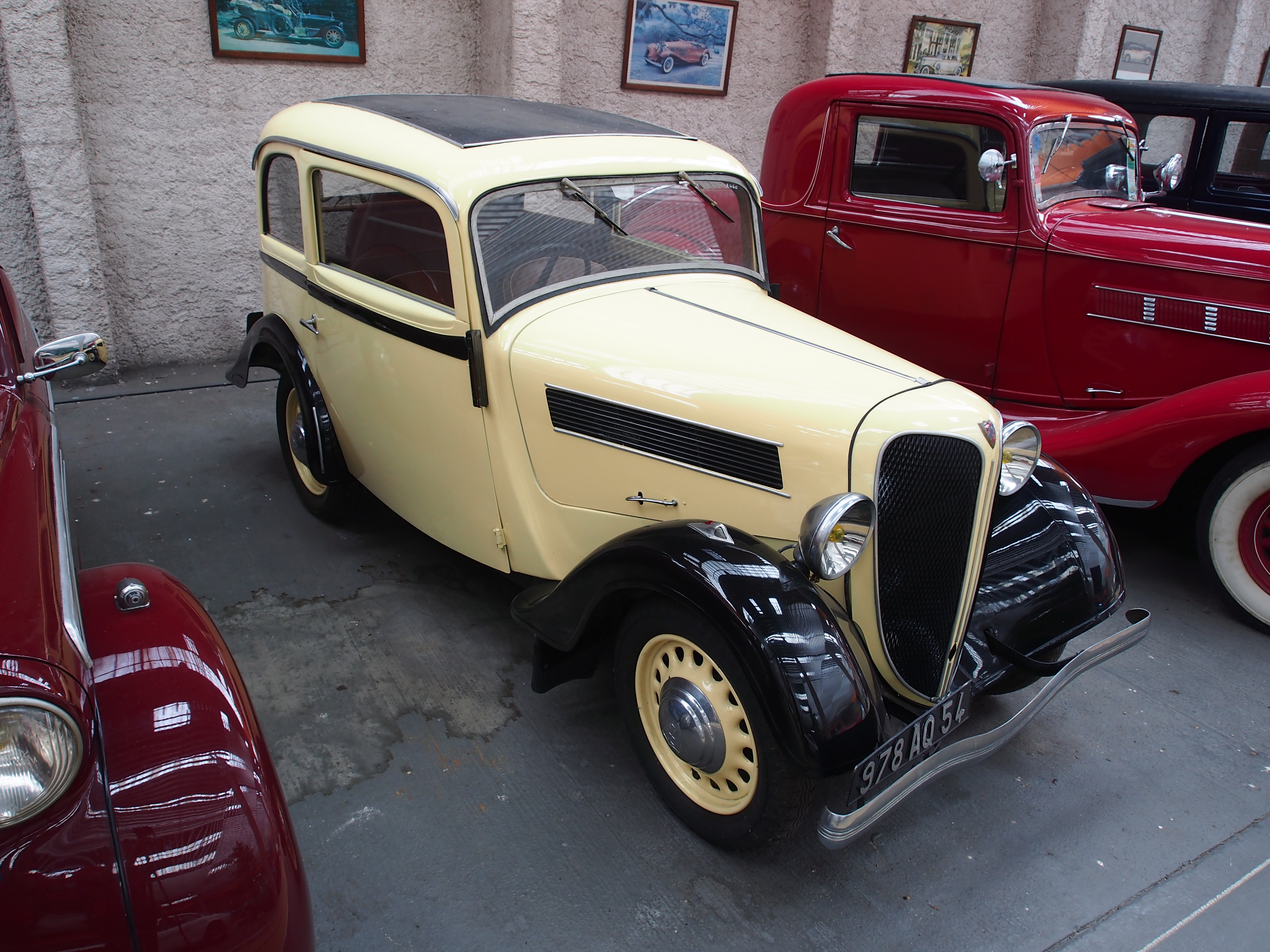 Photographed at the Association Lorraine des Amateurs d'Automobiles de collection et de loisirs.